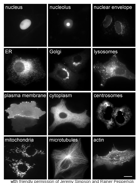 examples for subcellular localisations